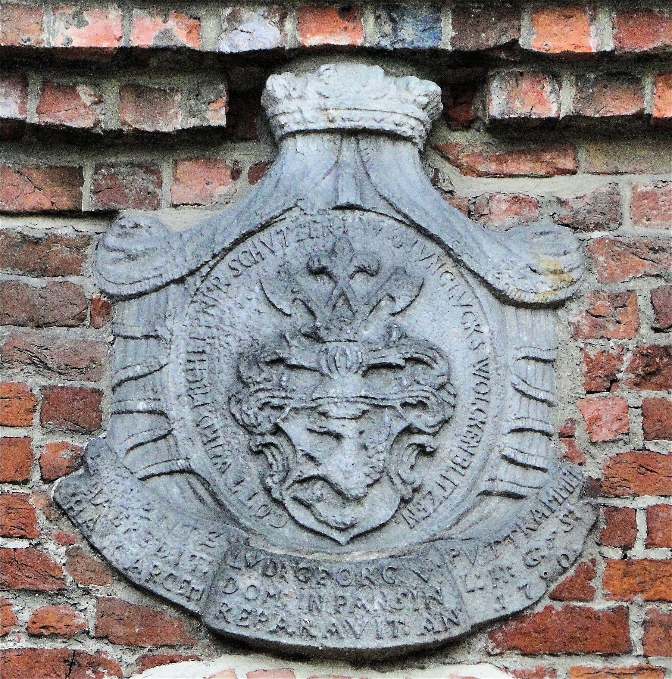 Zamek w Pęzinie